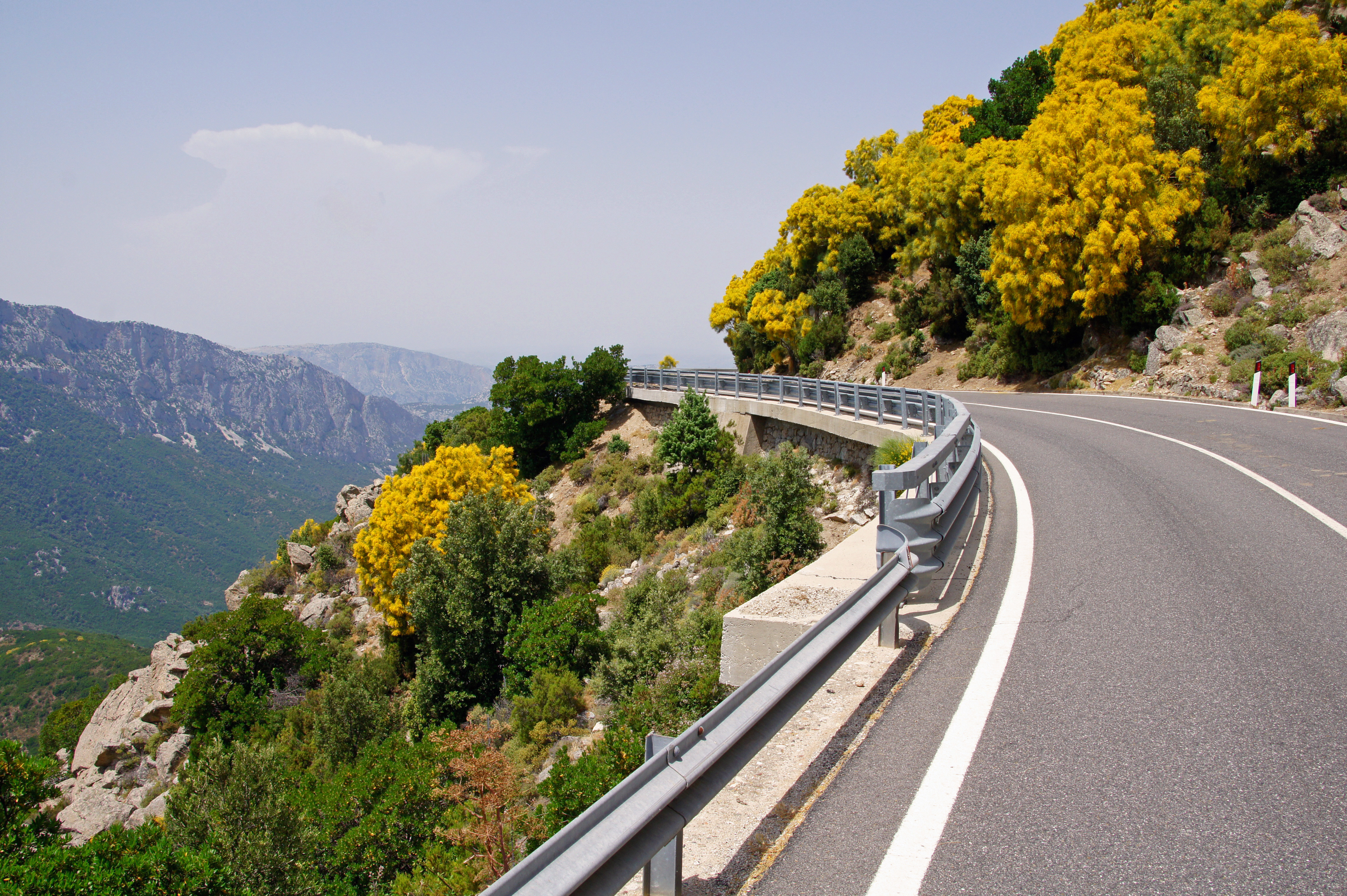 SS125 vor Dorgali